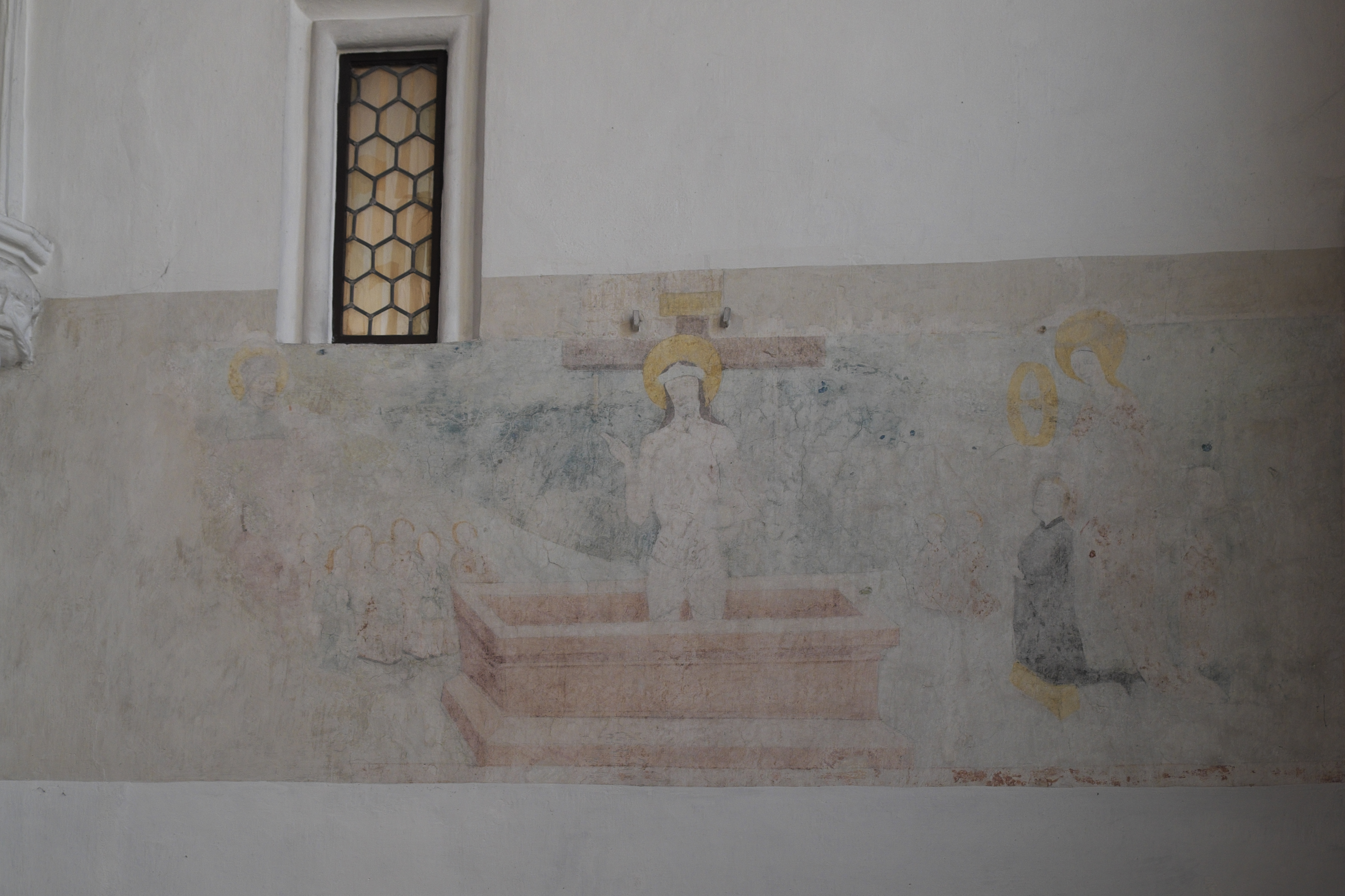 Katholische Pfarrkirche St. Jodok in Landshut (Bayern/Deutschland), Wandmalerei, Darstellung: Auferstehung Christi